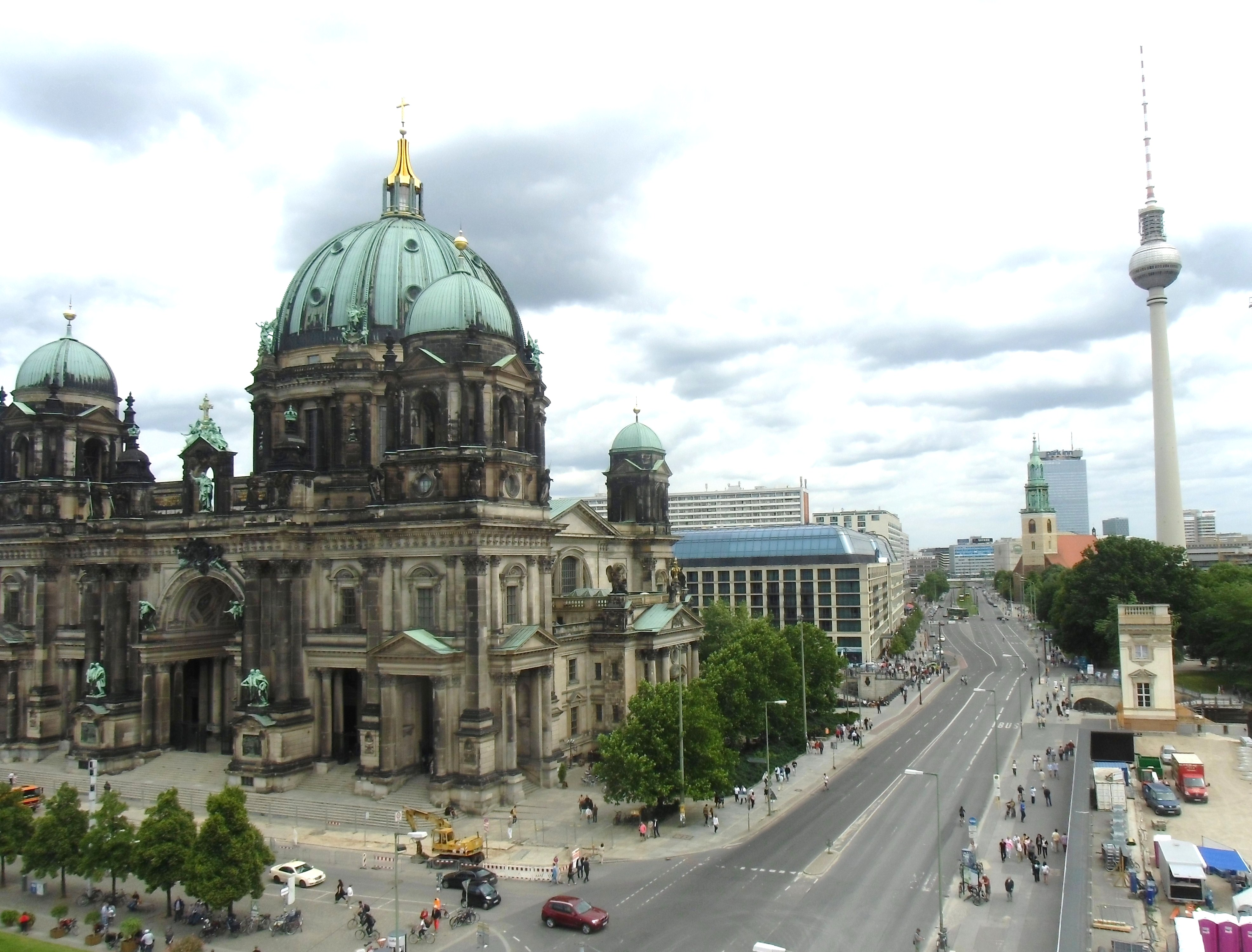 Blick von der Humboldt-Box auf die Karl-Liebknecht-Straße mit dem Berliner Dom